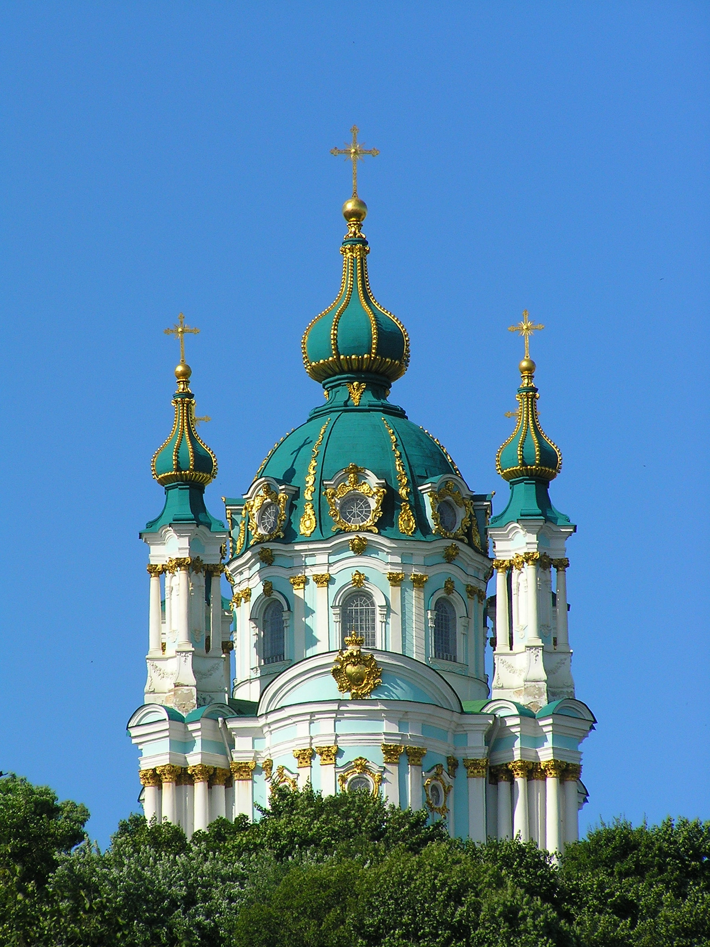 Київ, Андріївський узвіз, 23. Андріївська церква, вид з Подолу